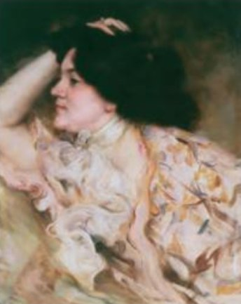 Portrait d'Erma Bossi par Carlo Wostry, conservé au Musée Revoltella de Trieste